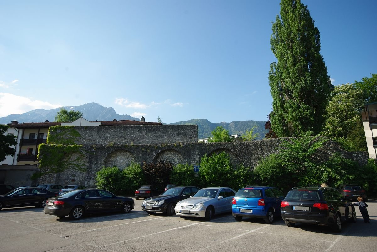 Stadtmauer Bad Reichenhall, am "Spitalparkplatz"This is a photograph of an architectural monument.